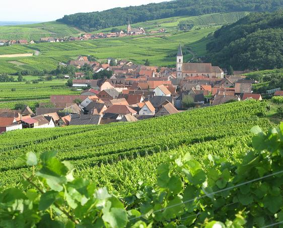 Un panorama des villages de Nothalten et Blienschwiller, encadrés par le vignoble et les collines sous-vosgiennes